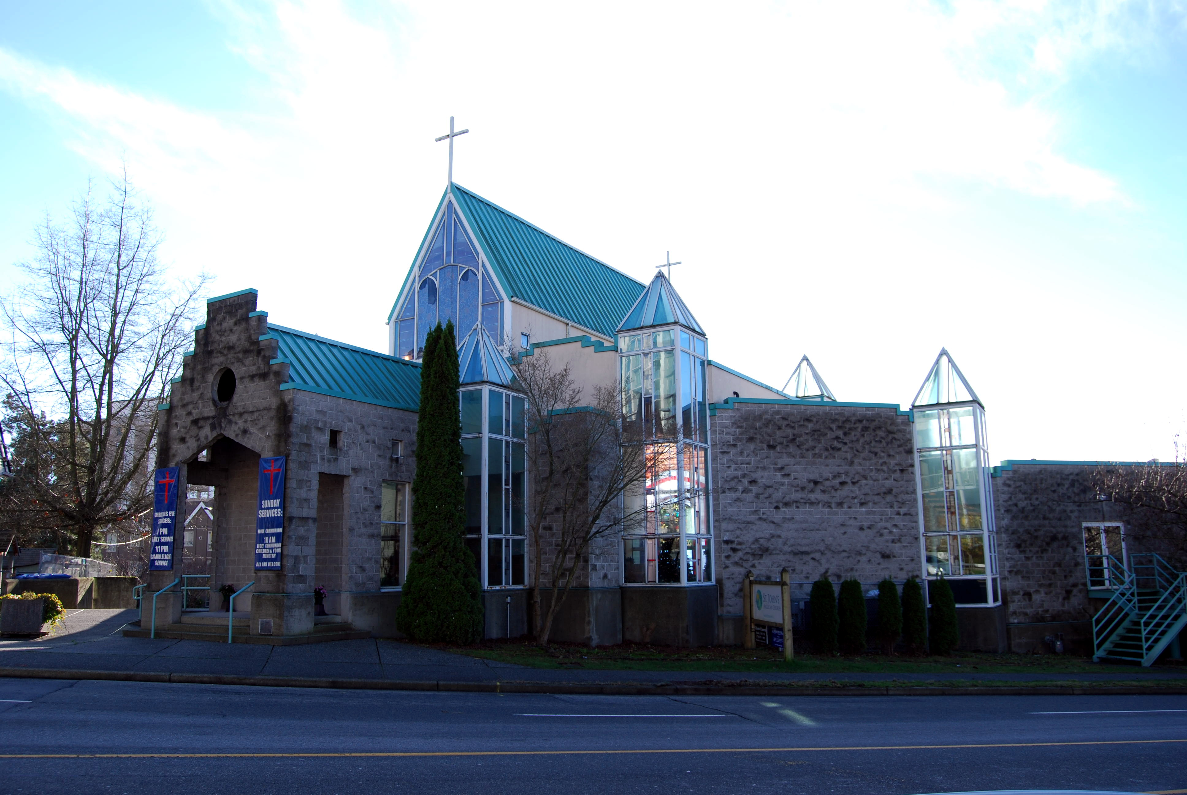 St. John's Anglican Church in North Vancouver, BC. View from the North.